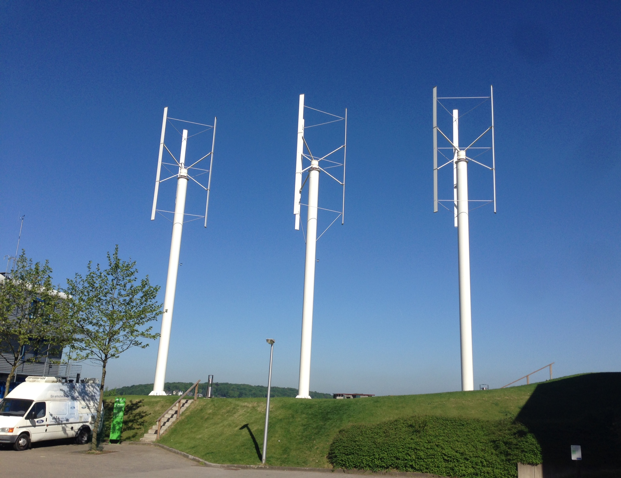 Windräder der Bergischen Universität im Sommer, Blick von Süden